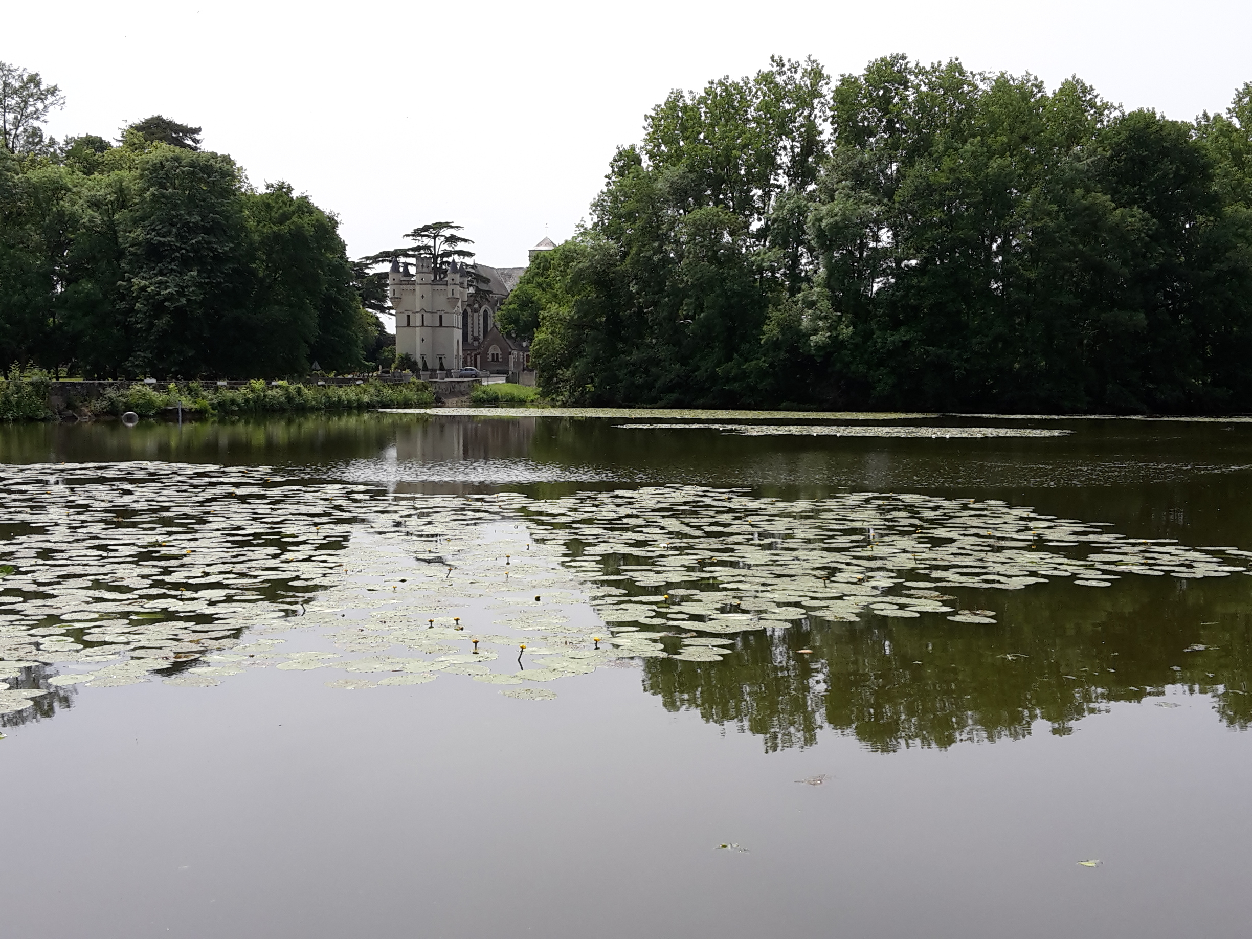 Etang de Challain, Maine-et-Loire, France.